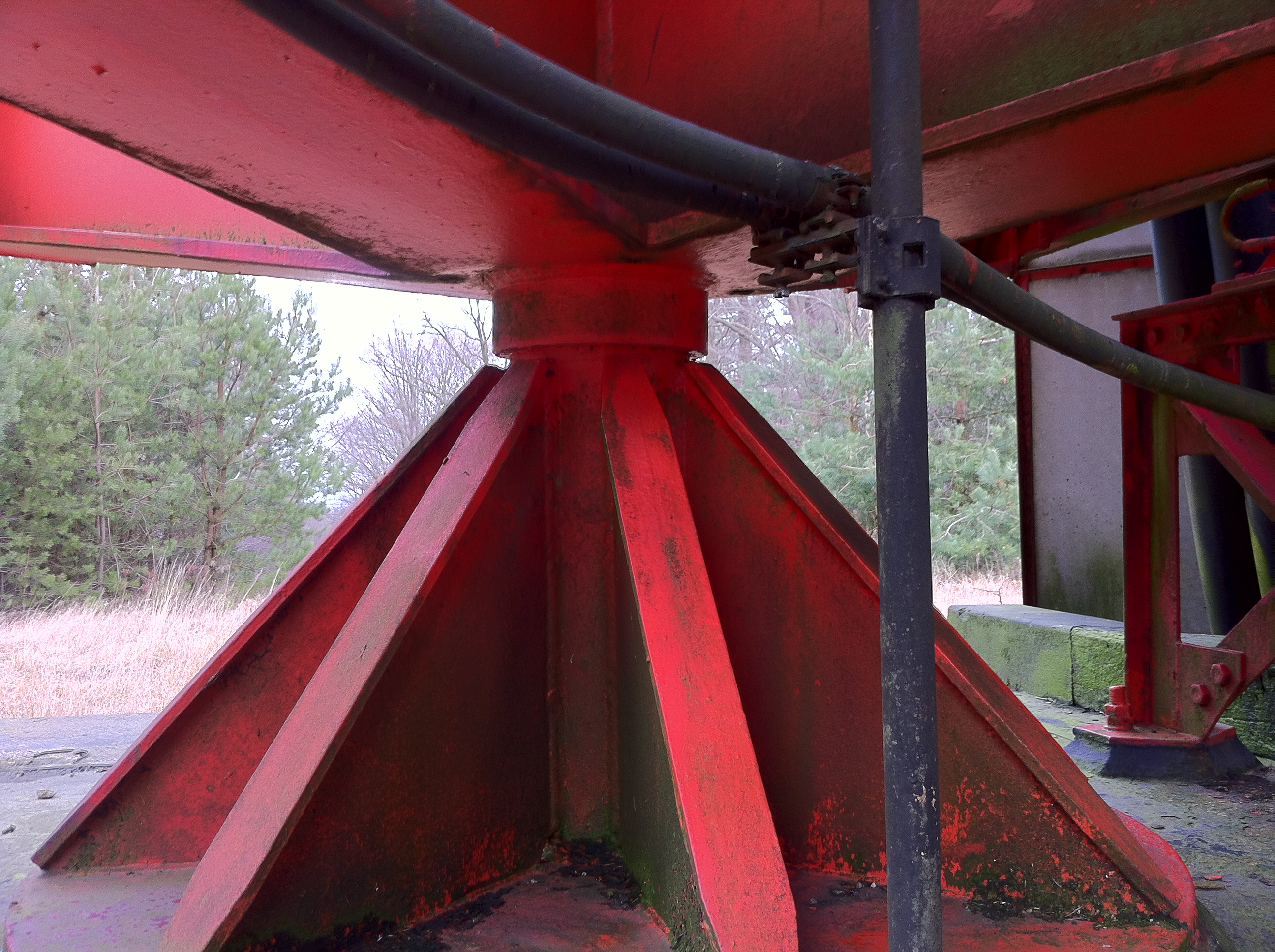 Fusspunkt des Radiosenders "Schleptruper Egge"